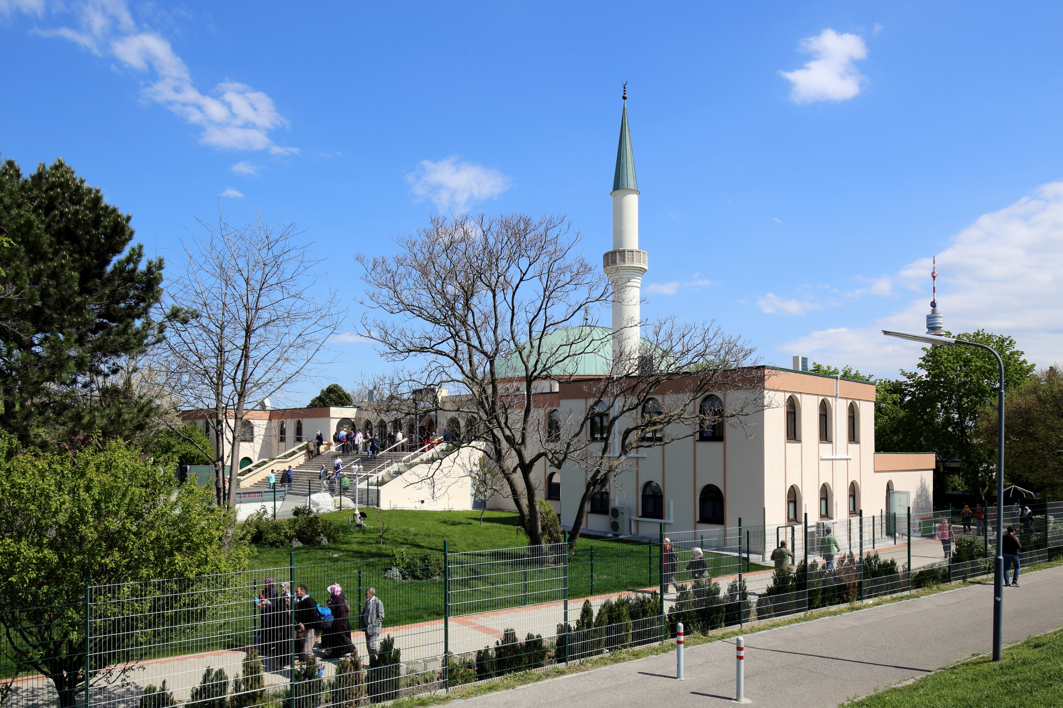 Westansicht des Islamischen Zentrum Wien in Bruckhaufen, ein Ortsteil im 21. Wiener Gemeindebezirk Floridsdorf.Die Moschee mit einem 32 m hohen Minarett und einer Kuppel mit rund 20 m Durchmesser wurde von 1975 bis 1979 von Baumeister Richard Lugner im Auftrag des saudi-arabischen Königs Faisal ibn Abd al-Aziz errichtet.